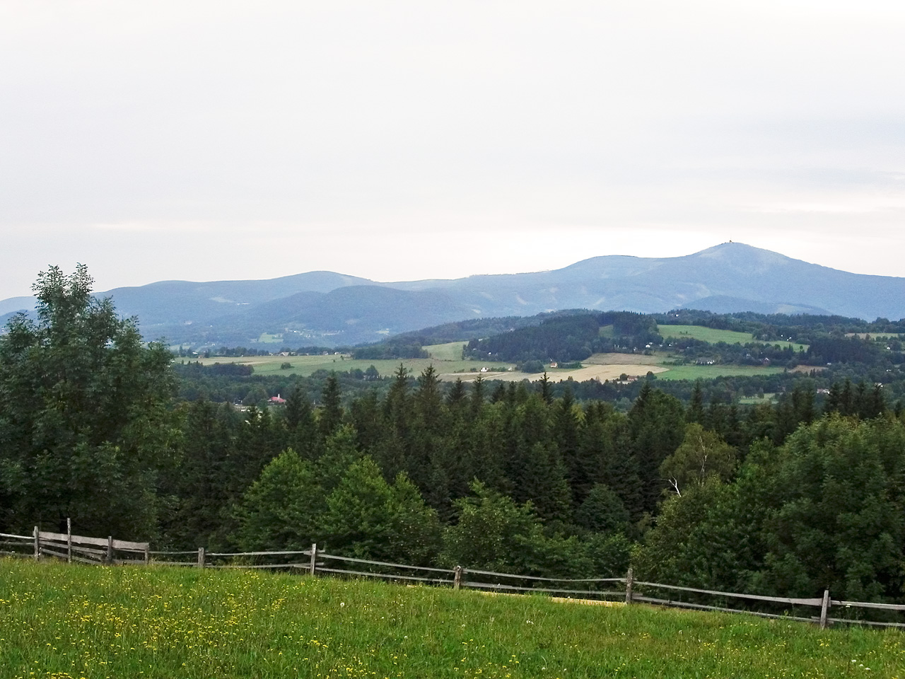 Moravian-Silesian Beskids (CZE) - from Kunčice pod Ondřejníkem.jpg